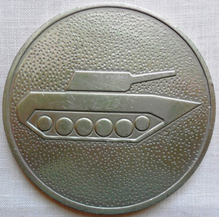 Medal pamiątkowy